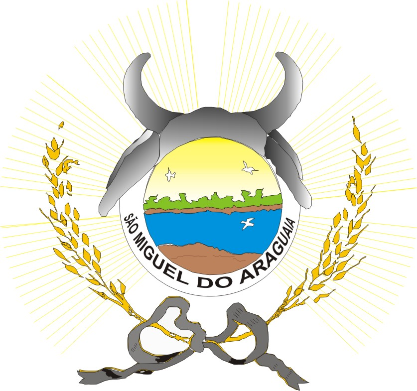 Brasão de São Miguel do Araguaia, Goiás